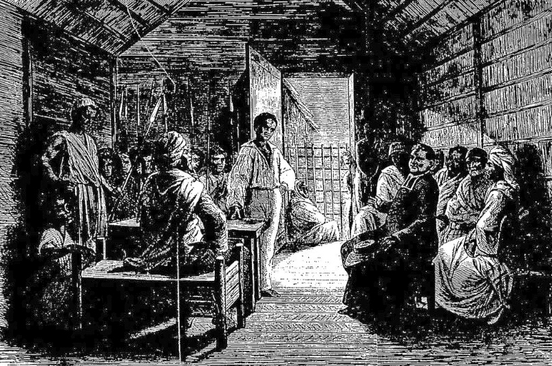 Gravure représentant le roi Tsimandroho et M. Dalmond à Nossi-Bé